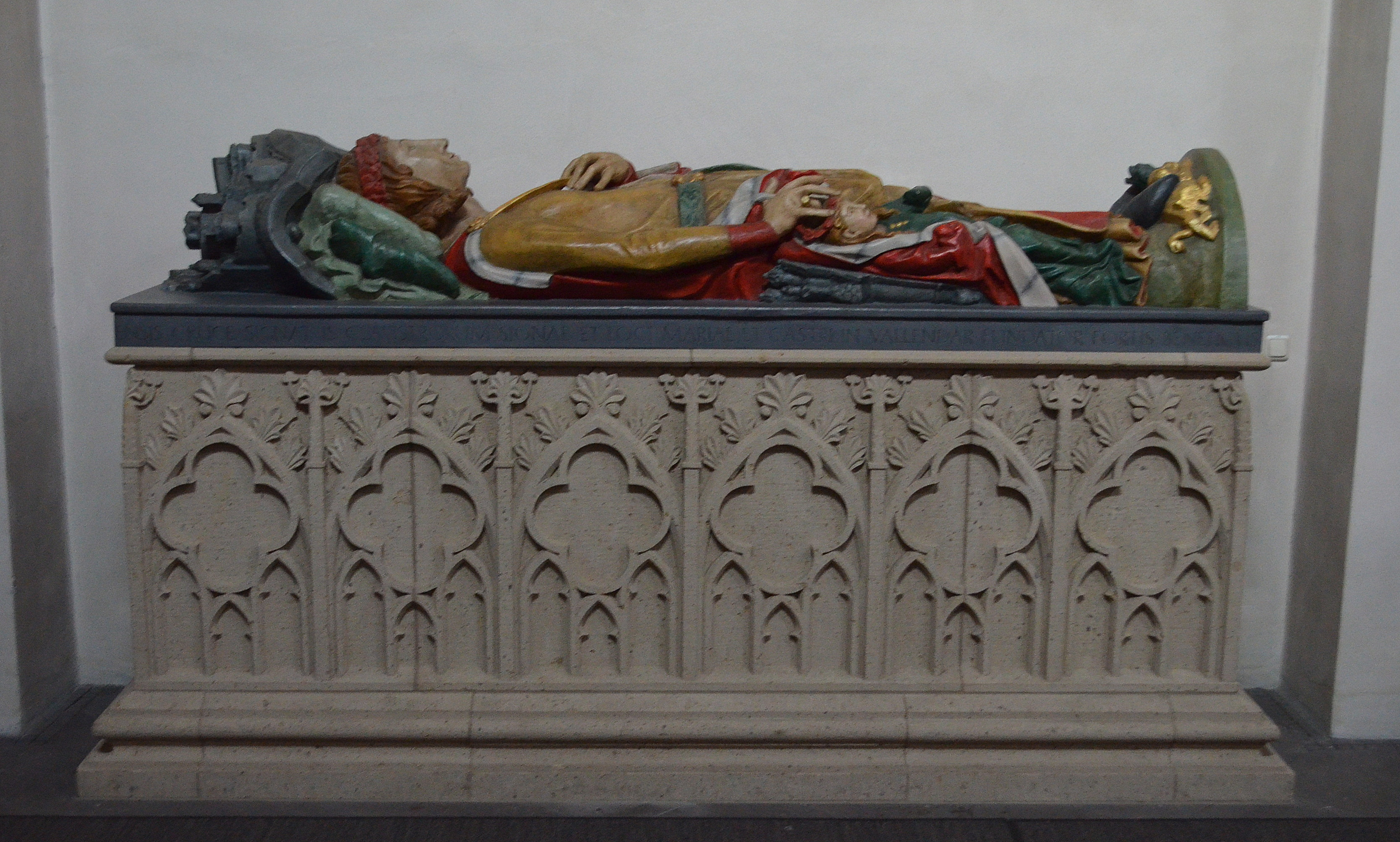 grafmonument graaf Hendrik III